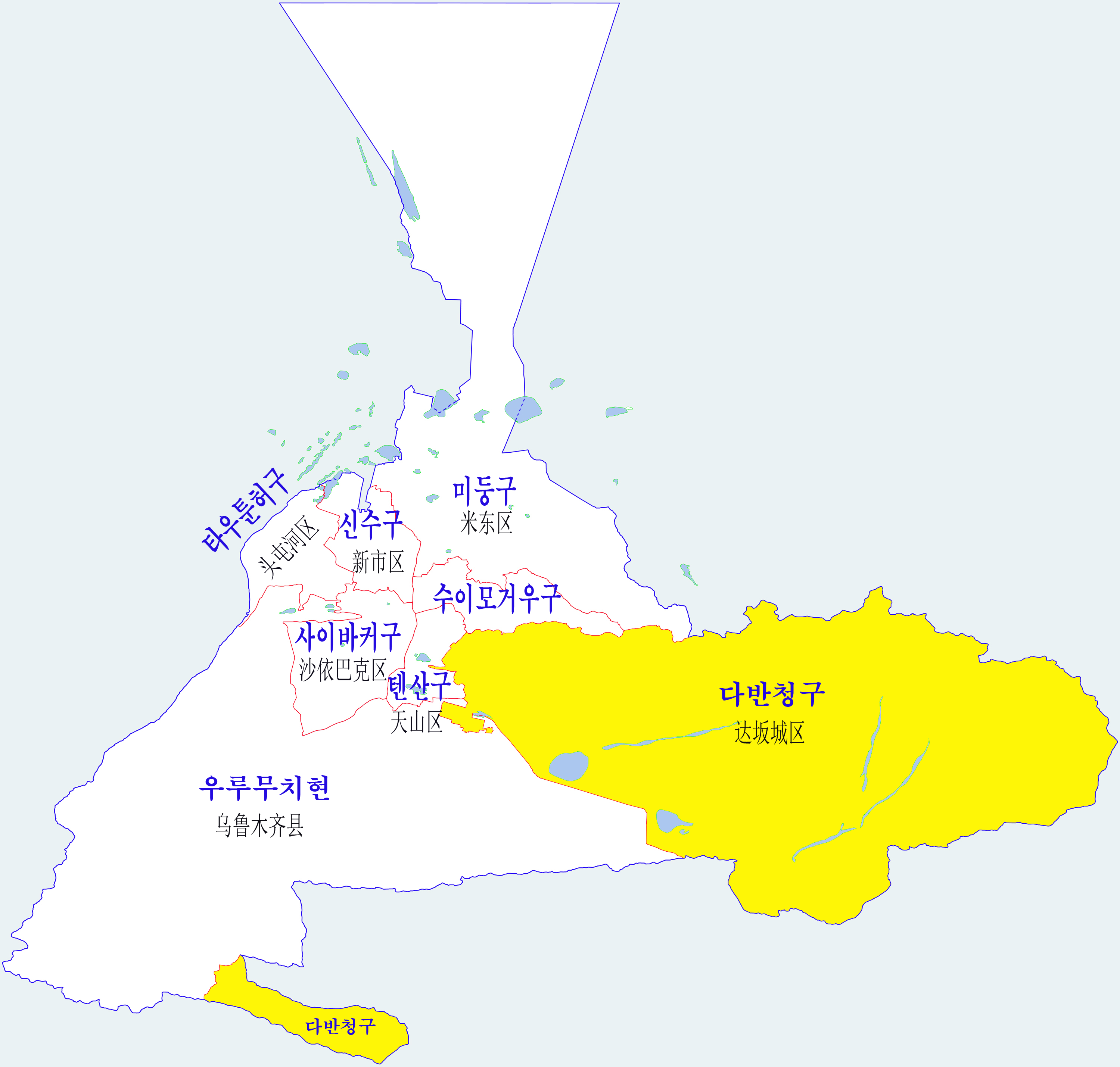 우루무츠시 현급 구성지도